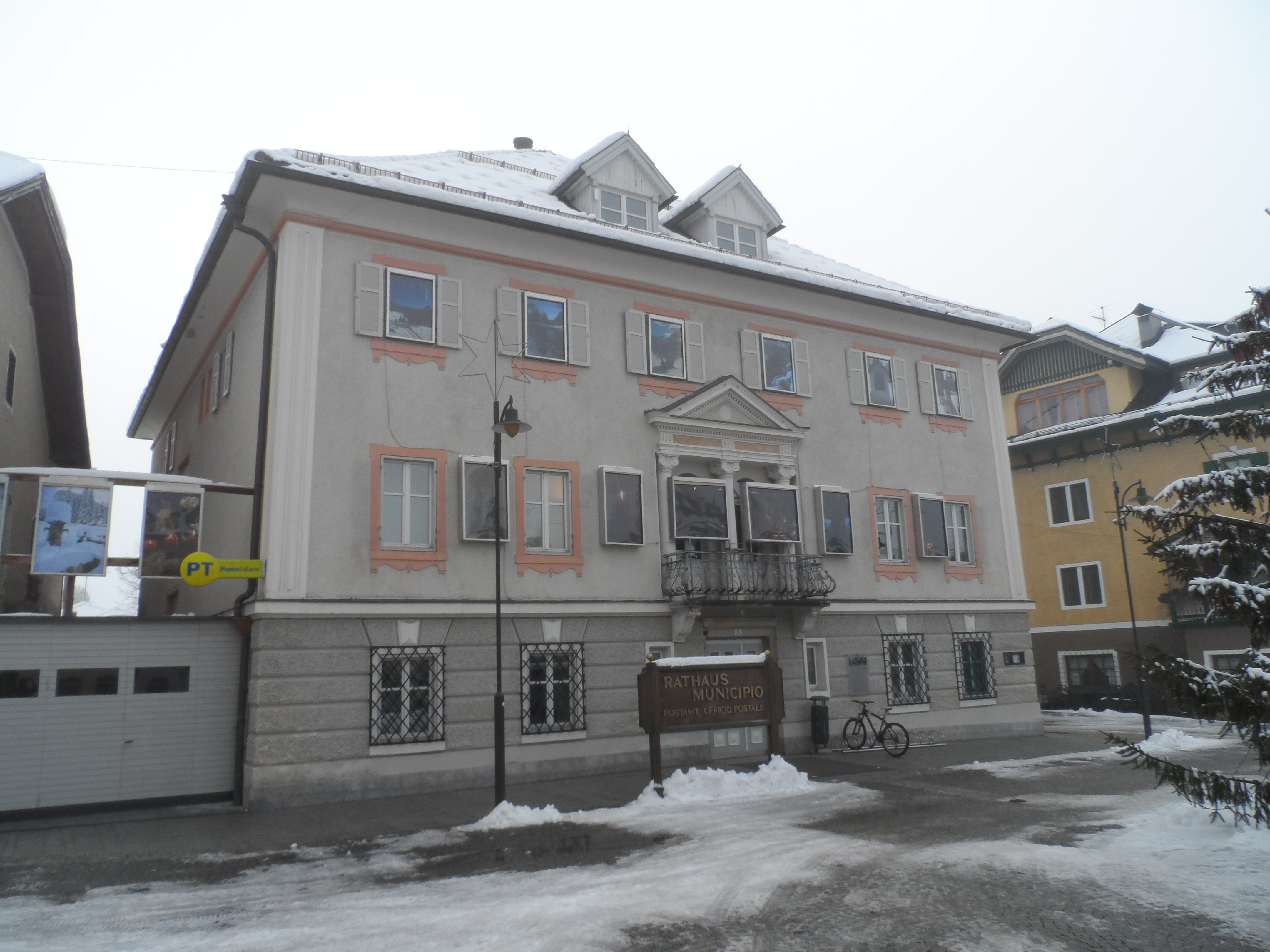 Rathaus - Niederdorf in Südtirol